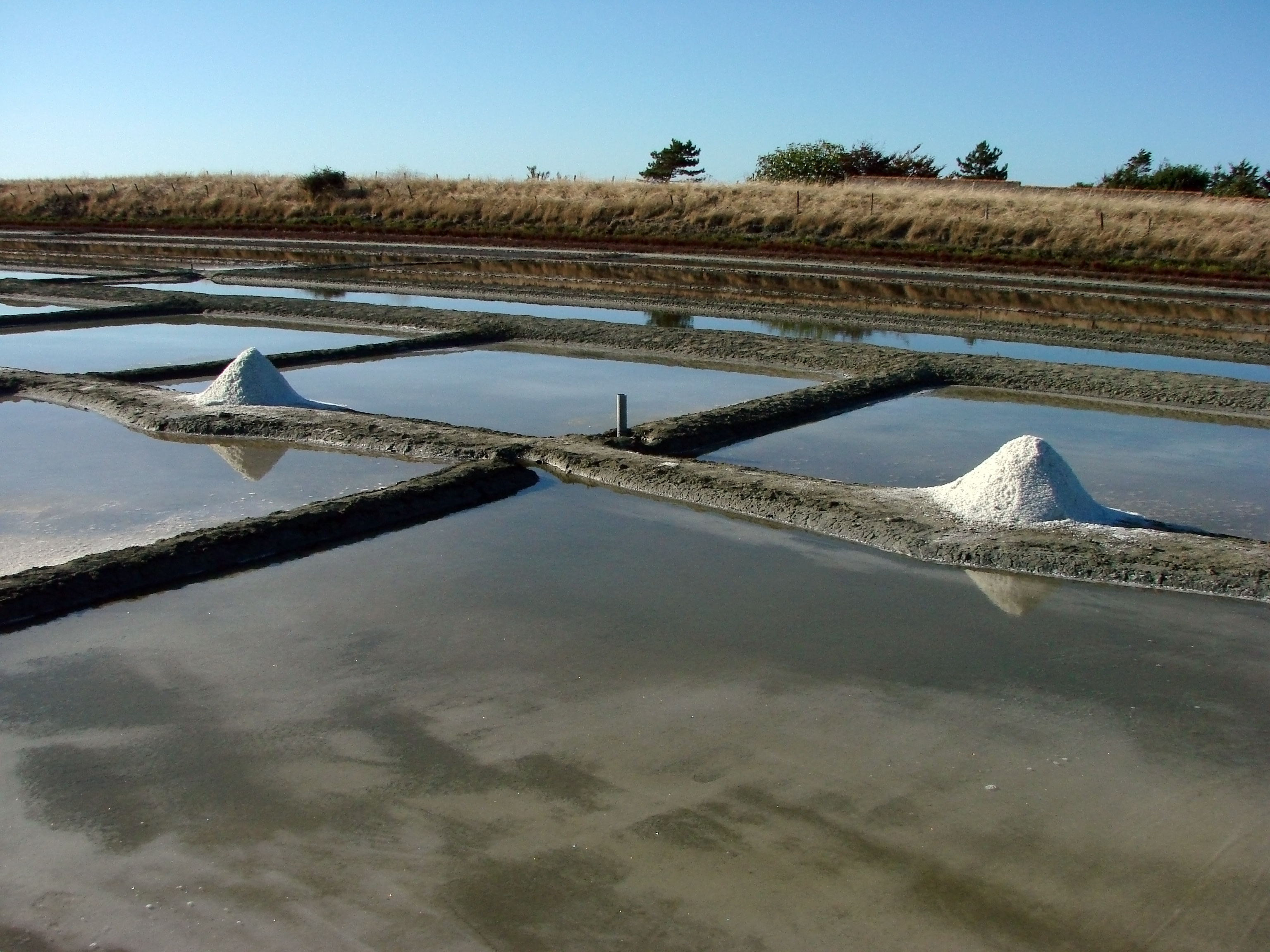 Marais salants prés de Loix, sur l'île de Ré.